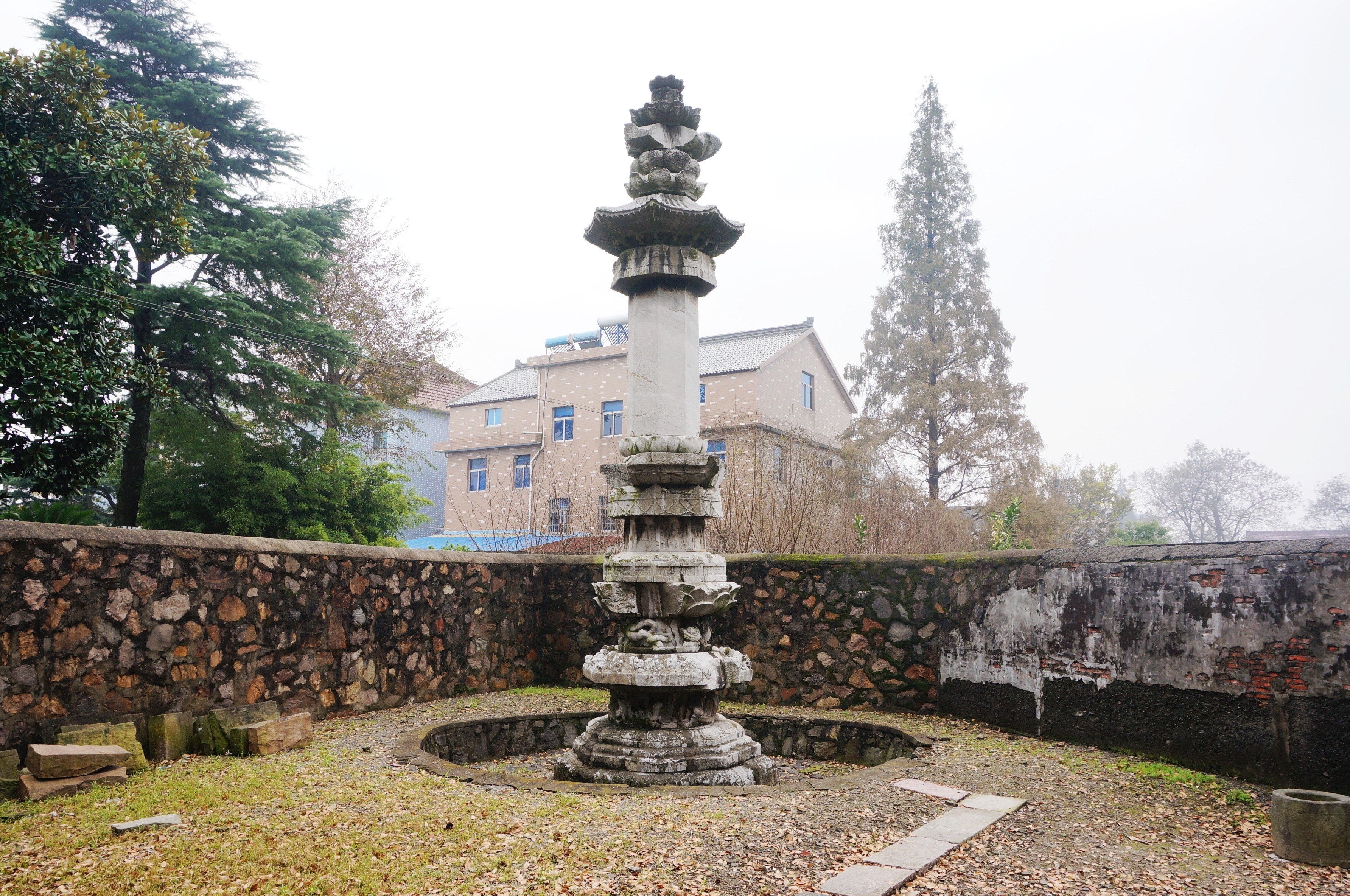 安国寺经幢，咸通六年（865）经幢北侧。